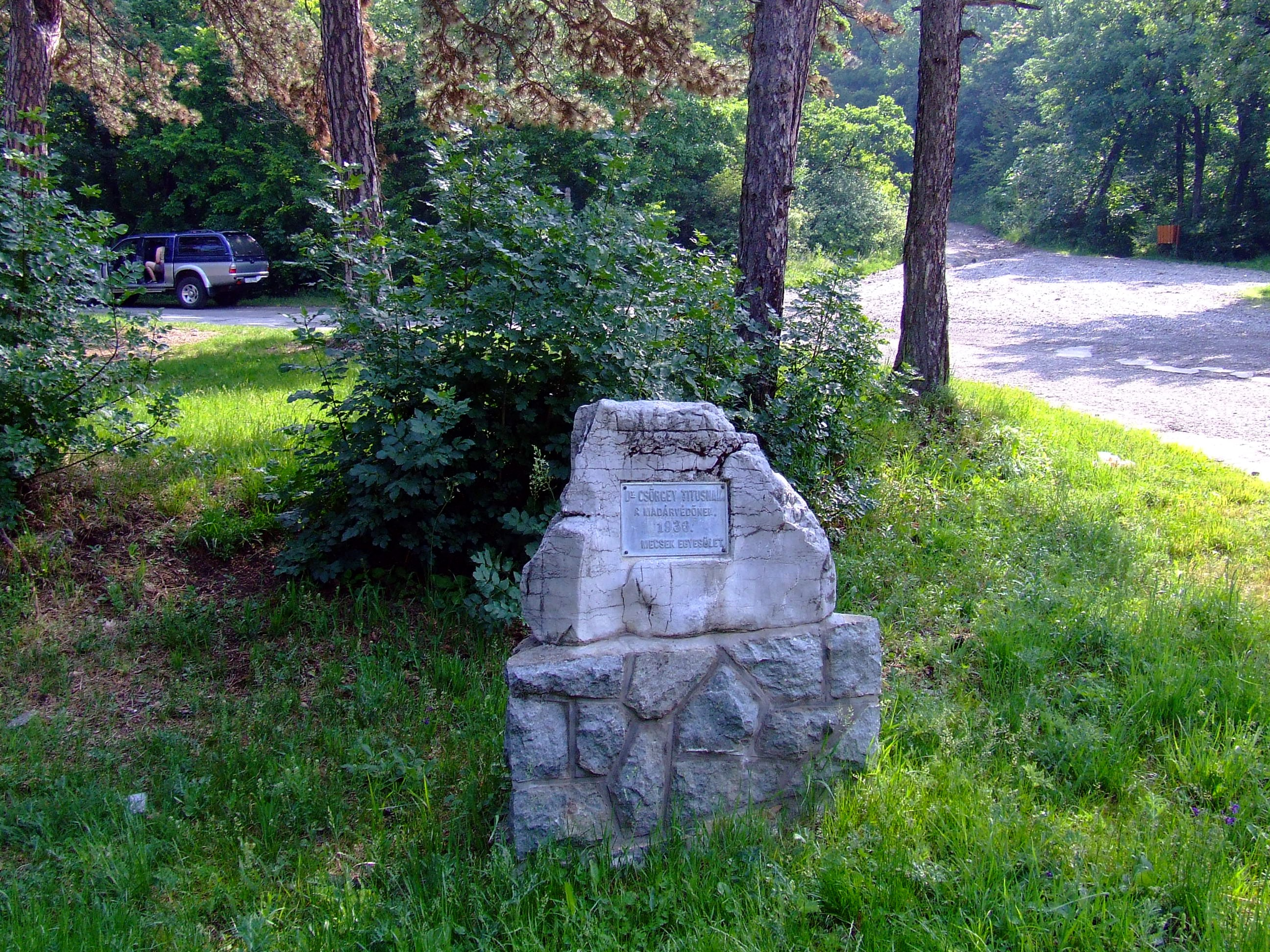 Csörgey Titusz-emlékmű a Mecsekben (N 46° 6,720' ; E 18° 11,827')